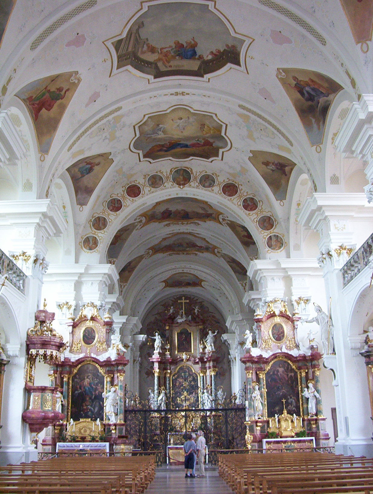 Klosterkirche St. Peter auf dem Schwarzwald, Blick zum Chor Fresken von Franz Joseph Spiegler Franz Joseph Spiegler (1691–1757) Description German painter Date of birth/death5 April 169115 April 1757Location of birth/deathWangen im Allgäu, GermanyKonstanz, GermanyWork periodcirca 1722-c.1754Work locationWangen, München, Ottobeuren, Zwiefalten, St. Peter (Hochschwarzwald), OberschwabenAuthority control VIAF: 22937725 LCCN: no90002322 GND: 118798251 ULAN: 500015403 ISNI: 0000 0001 1690 4280 WorldCat WP-Person